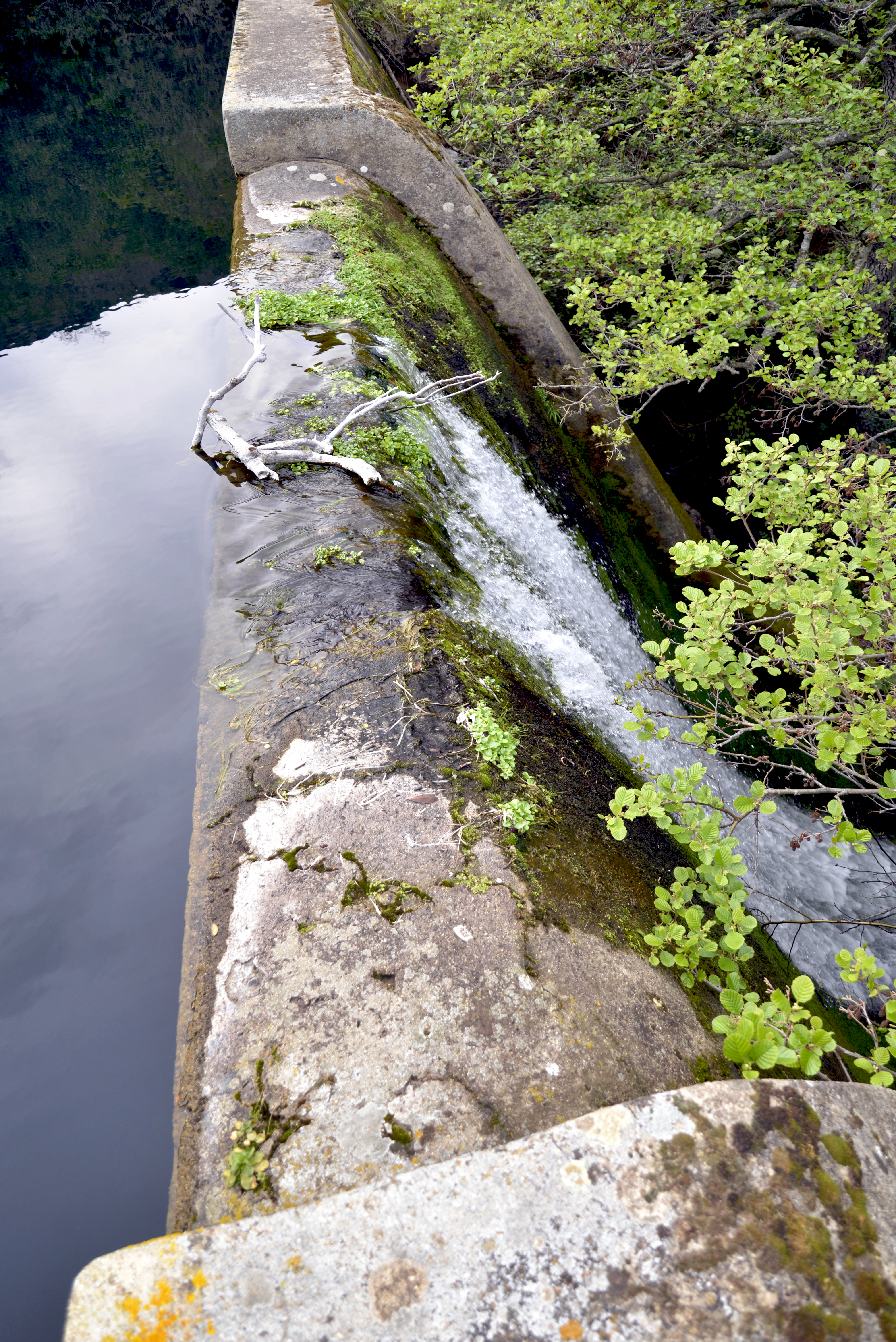 Galéria, Filosorma (Haute-Corse) - L'exutoire du barrage de Calca Tavulaghjiu, sur le ruisseau de Tavulaghjiu, au sud du village.